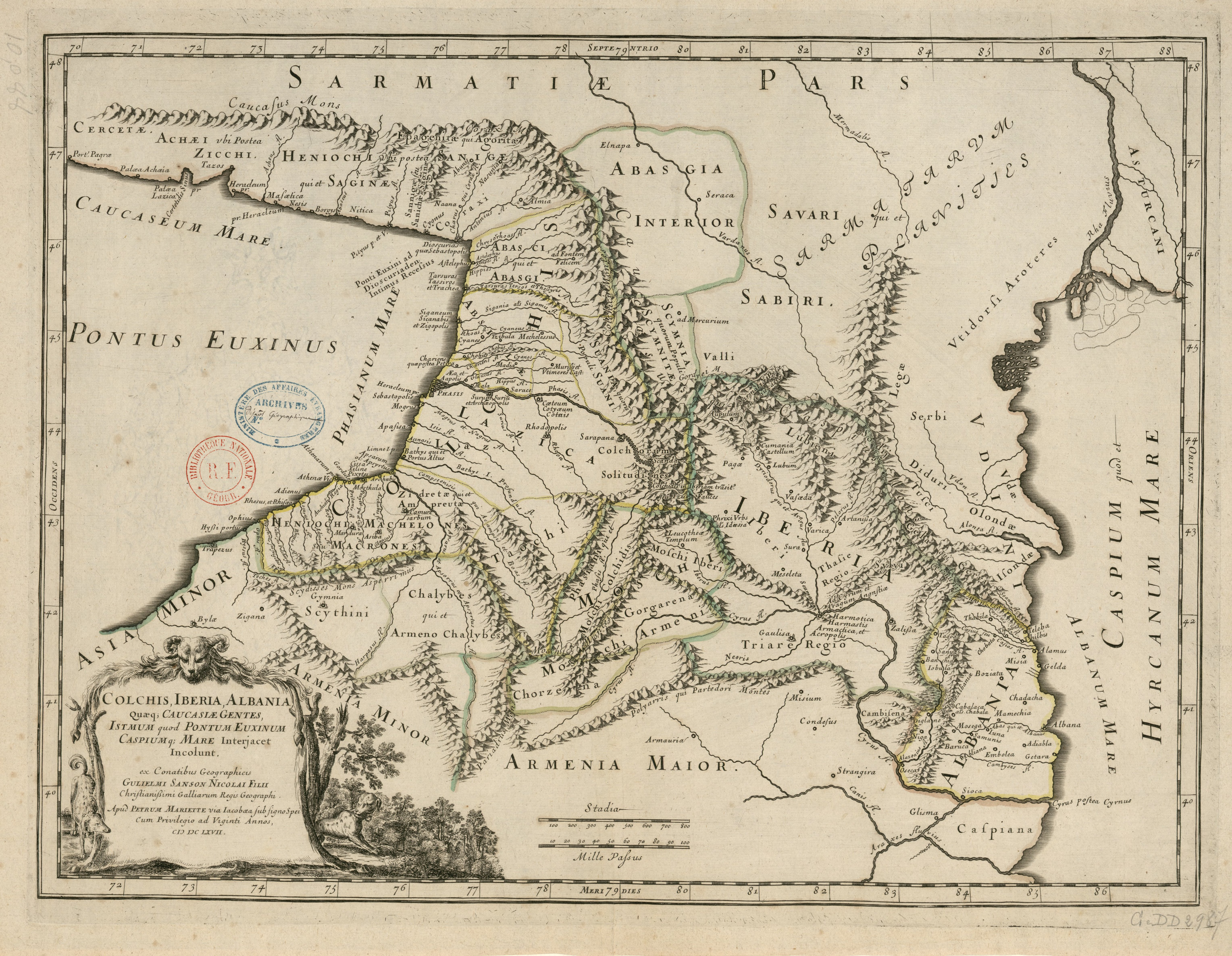 Colchis, Iberia, Albania quae q., Caucasiae gentes, istmum quod Pontum Euxinum Caspium q., mare interjacet incolunt / ex conatibus geogaphicis Gulielmi Sanson.